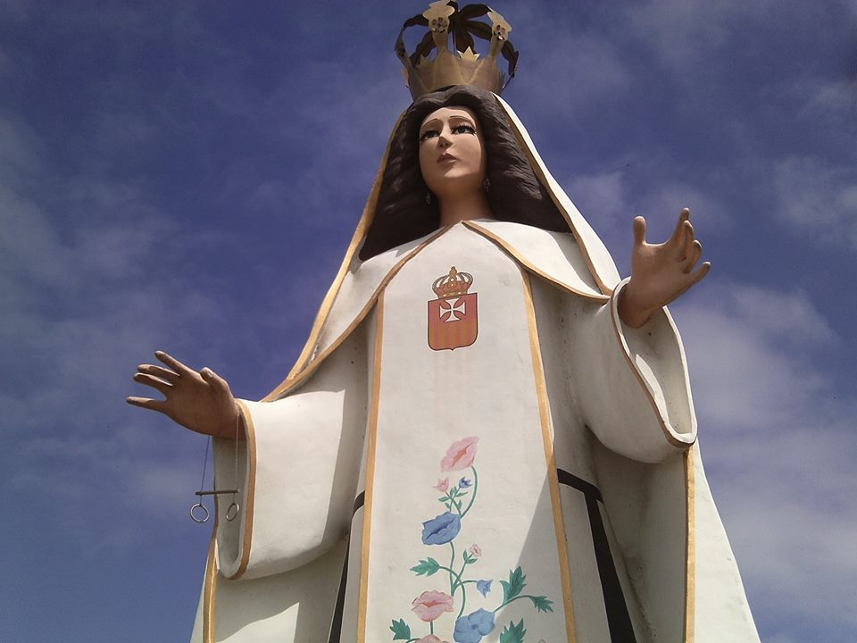 Monumento de la virgen de Las Mercedes, en la Avenida Intercomunal de Río Chico, Miranda, Venezuela.